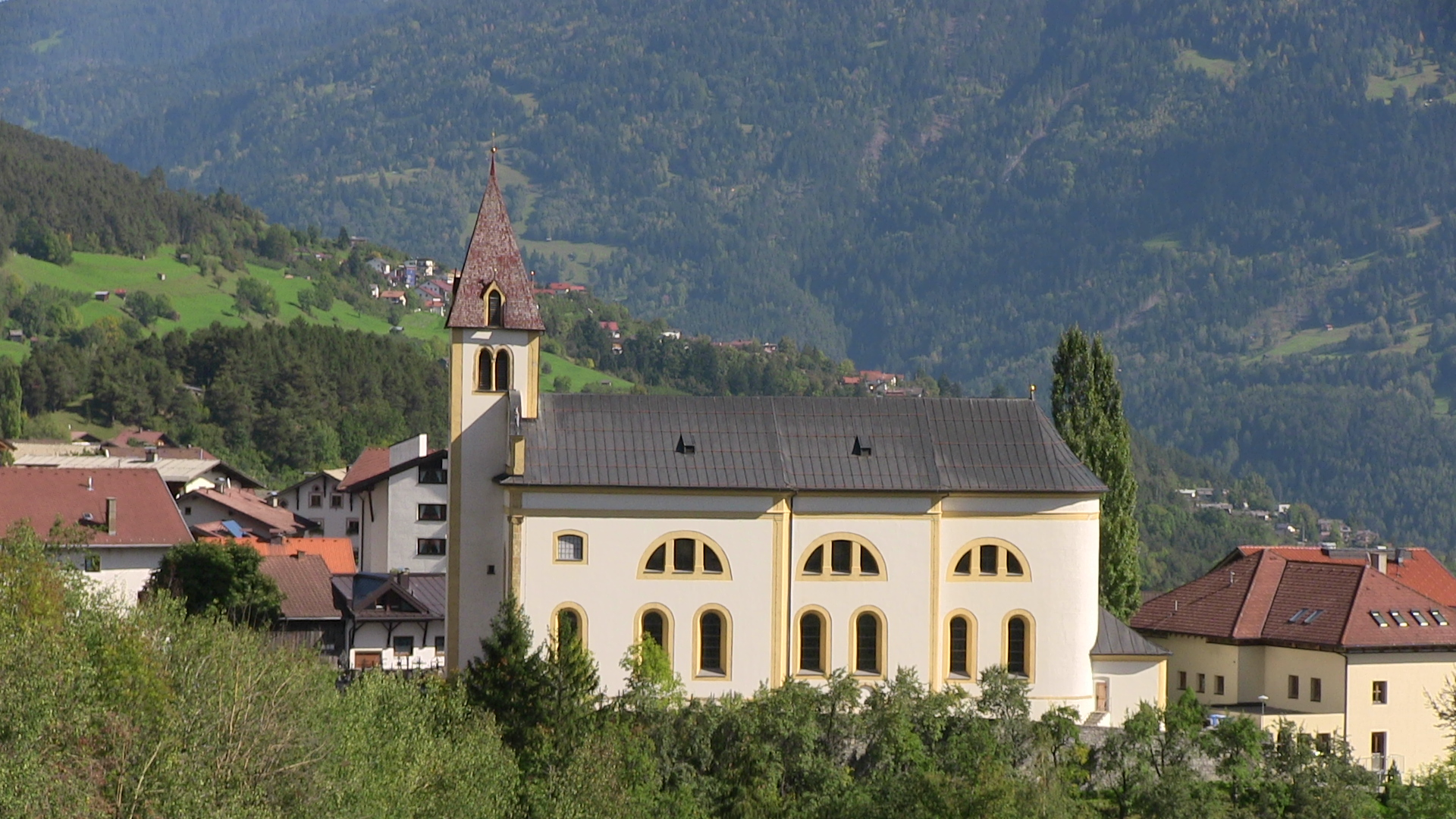 Kath. Pfarrkirche hl. Nikolaus